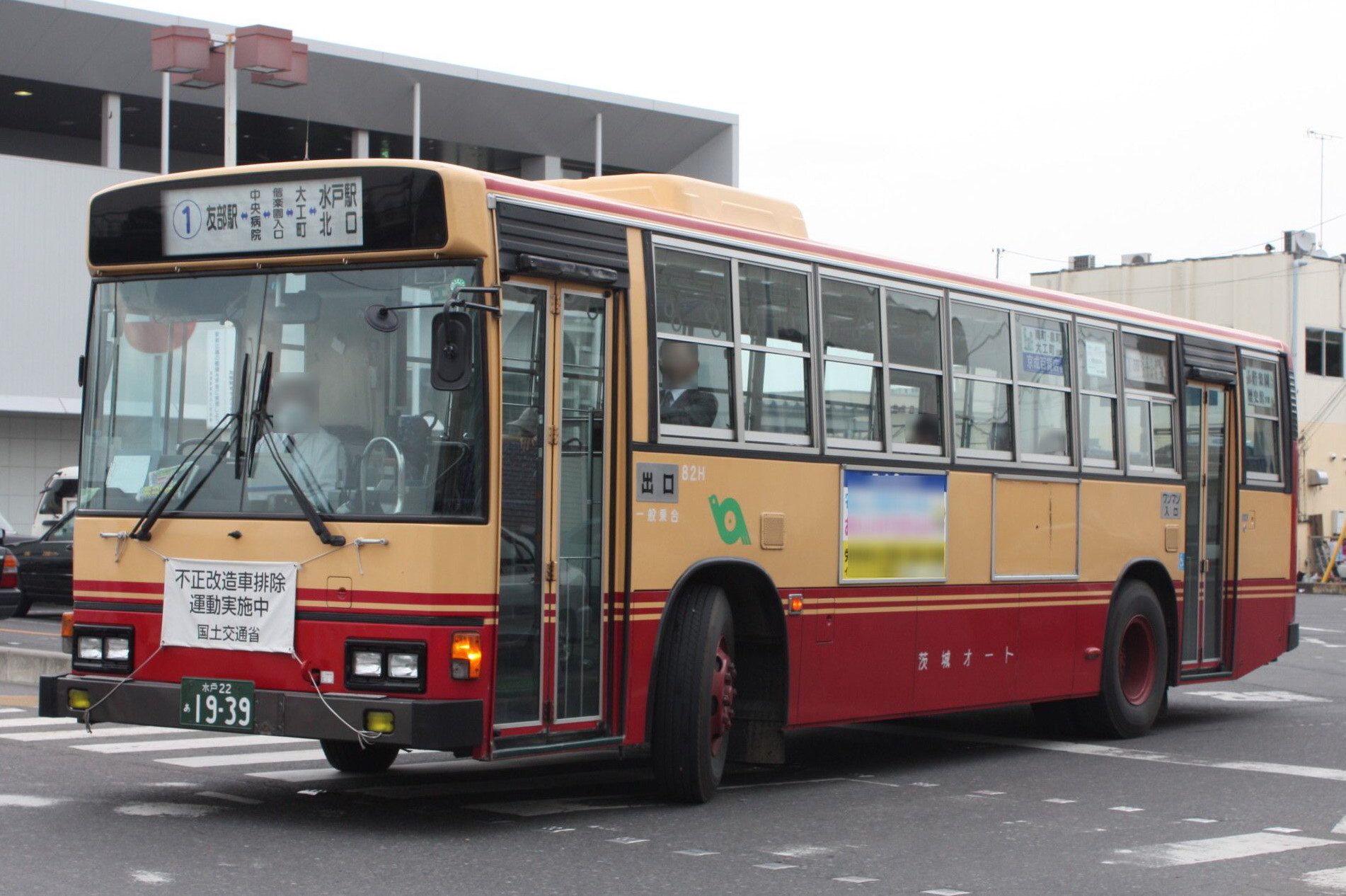 茨城オート 水戸22あ1939 KC-HT2MMCA